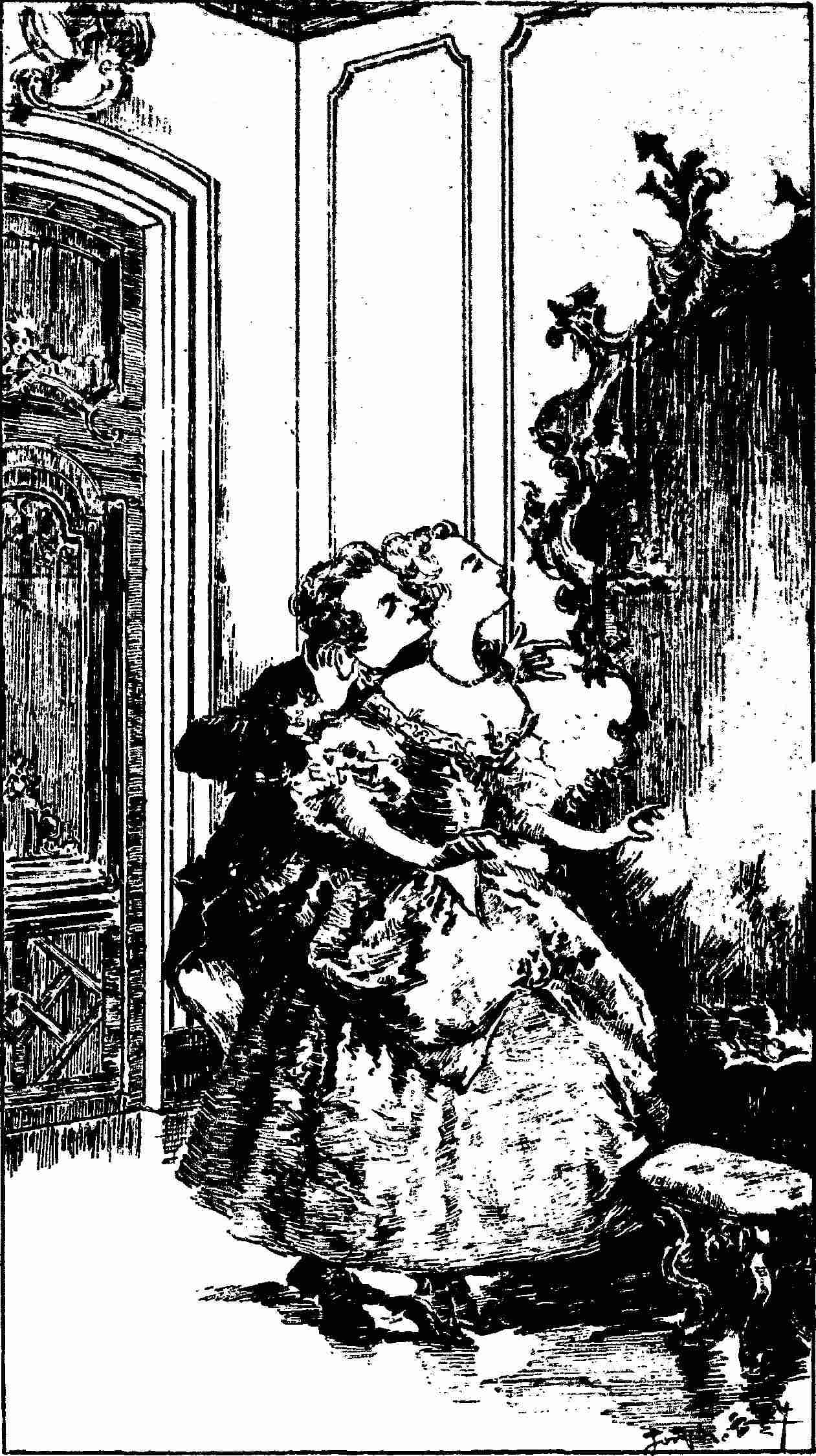 Lady Roxana